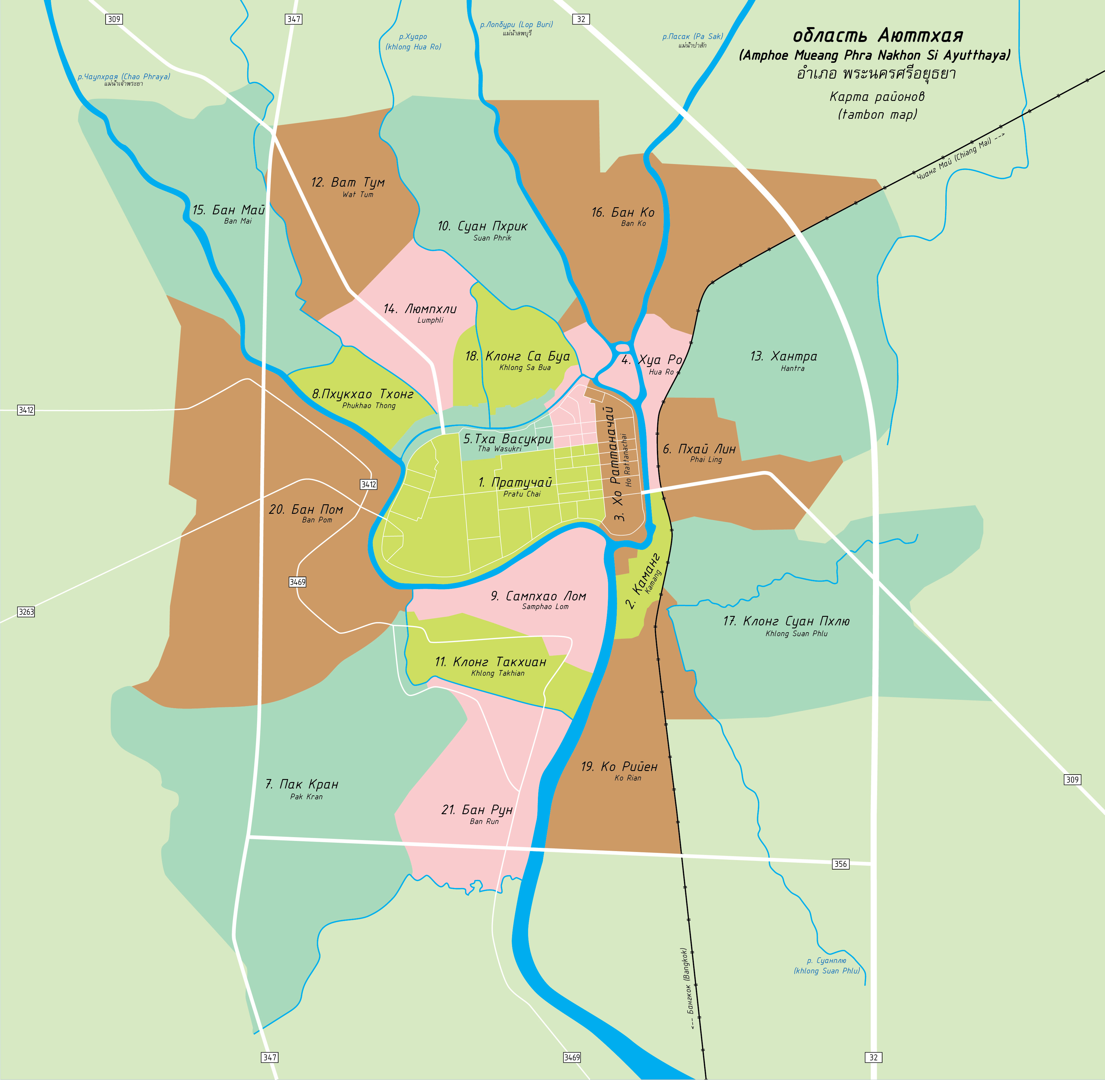 Карта тхесабанов (районов) ампхо Аюттхая